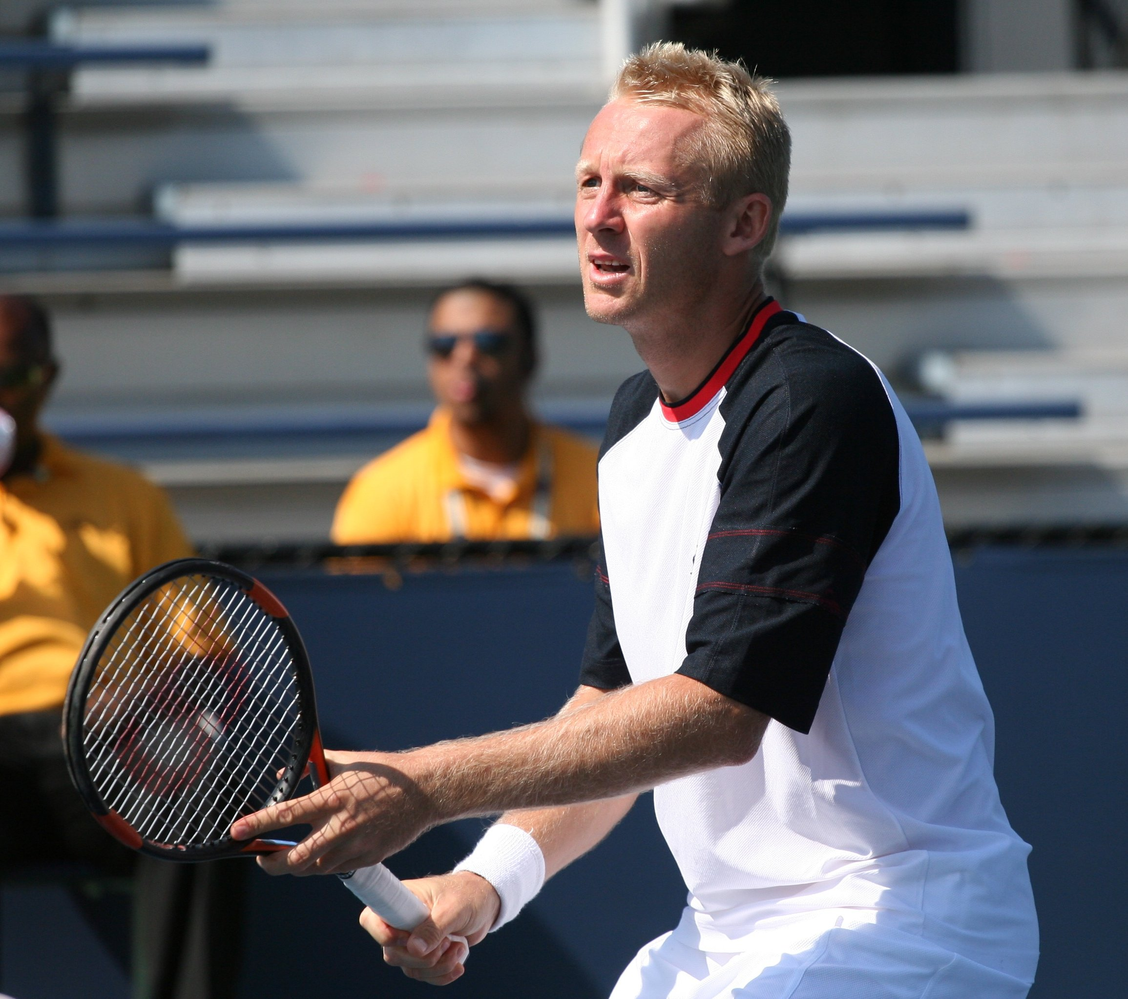 U.S. Open Saturday, Sept. 5, 2009